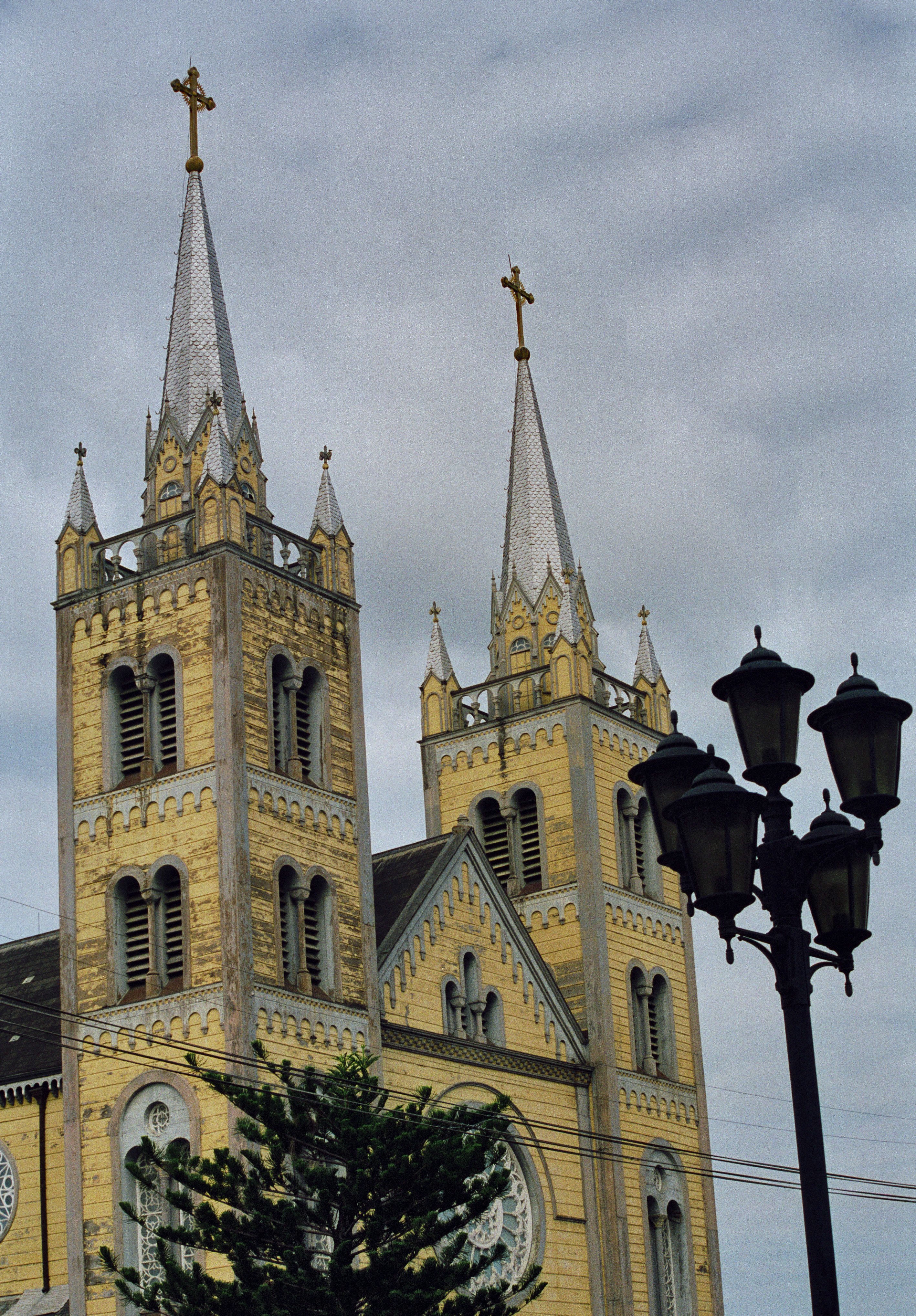 Sint-Petrus en Pauluskerk: Overzicht van het dubbele torenfront in de westgevel (opmerking: Suriname Reis Loek Tangel)